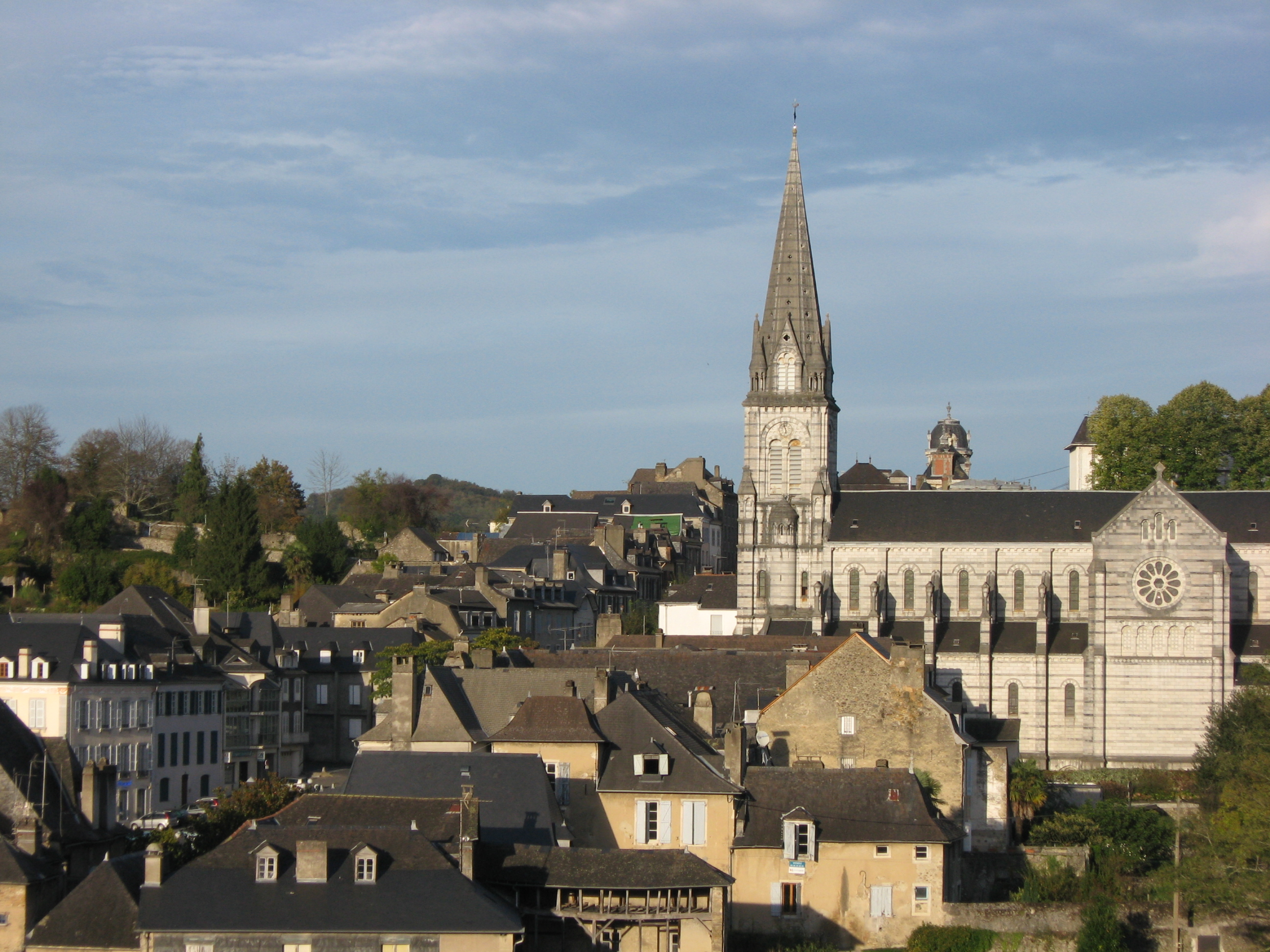 Eglise Notre Dame depuis les lacets du Biscondau (Oloron-Sainte-Marie) (Pyrénées-Atlantiques) Pyrénées).